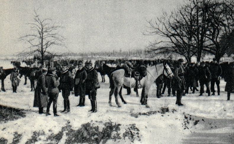 2 pułk ułanów Polskiego Korpusu Posiłkowego podczas przemarszu z Oszechlib do Synowódzka.